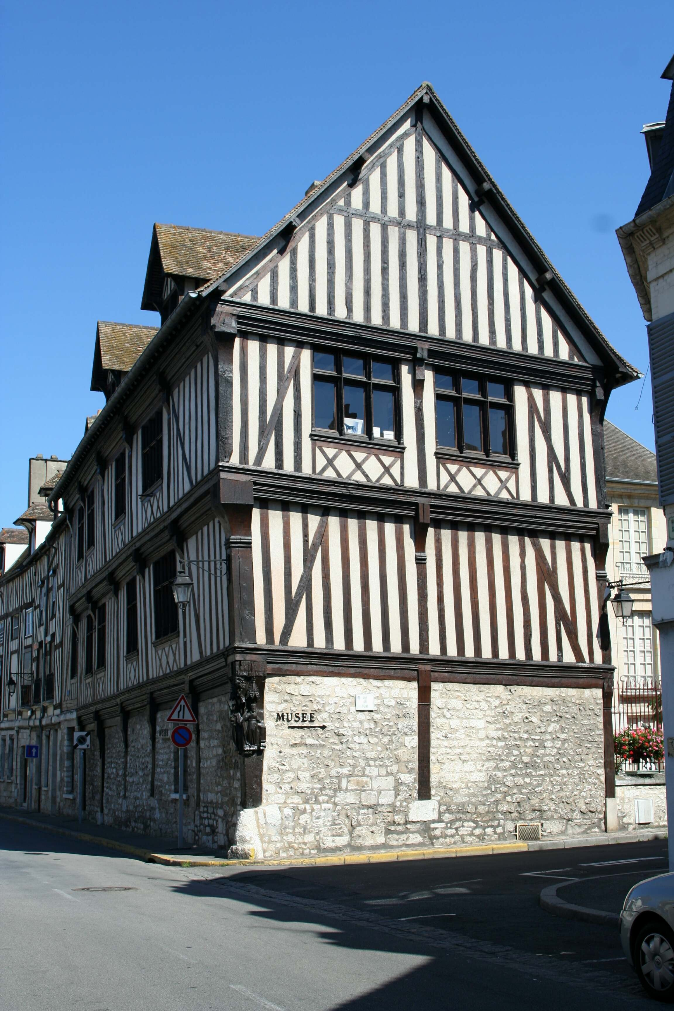 Le musée Alphonse-Georges Poulain (un archéologue) à Vernon, Eure (France)